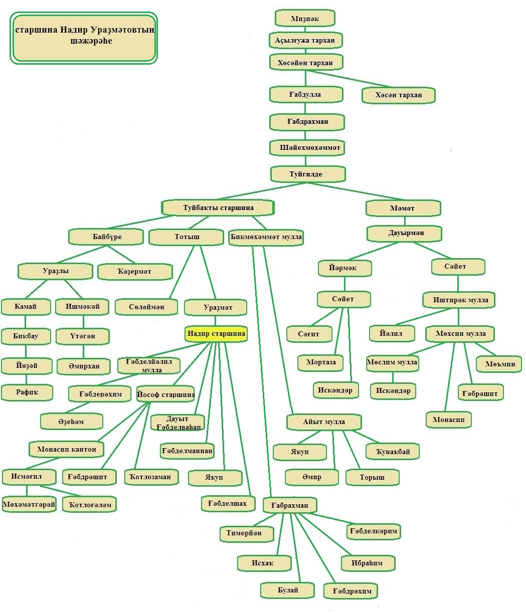 Башҡортса: Надир Ураҙмәтов шәжәрәһе